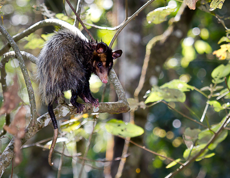 Encontrava-se sem ação em cima de uma árvore.